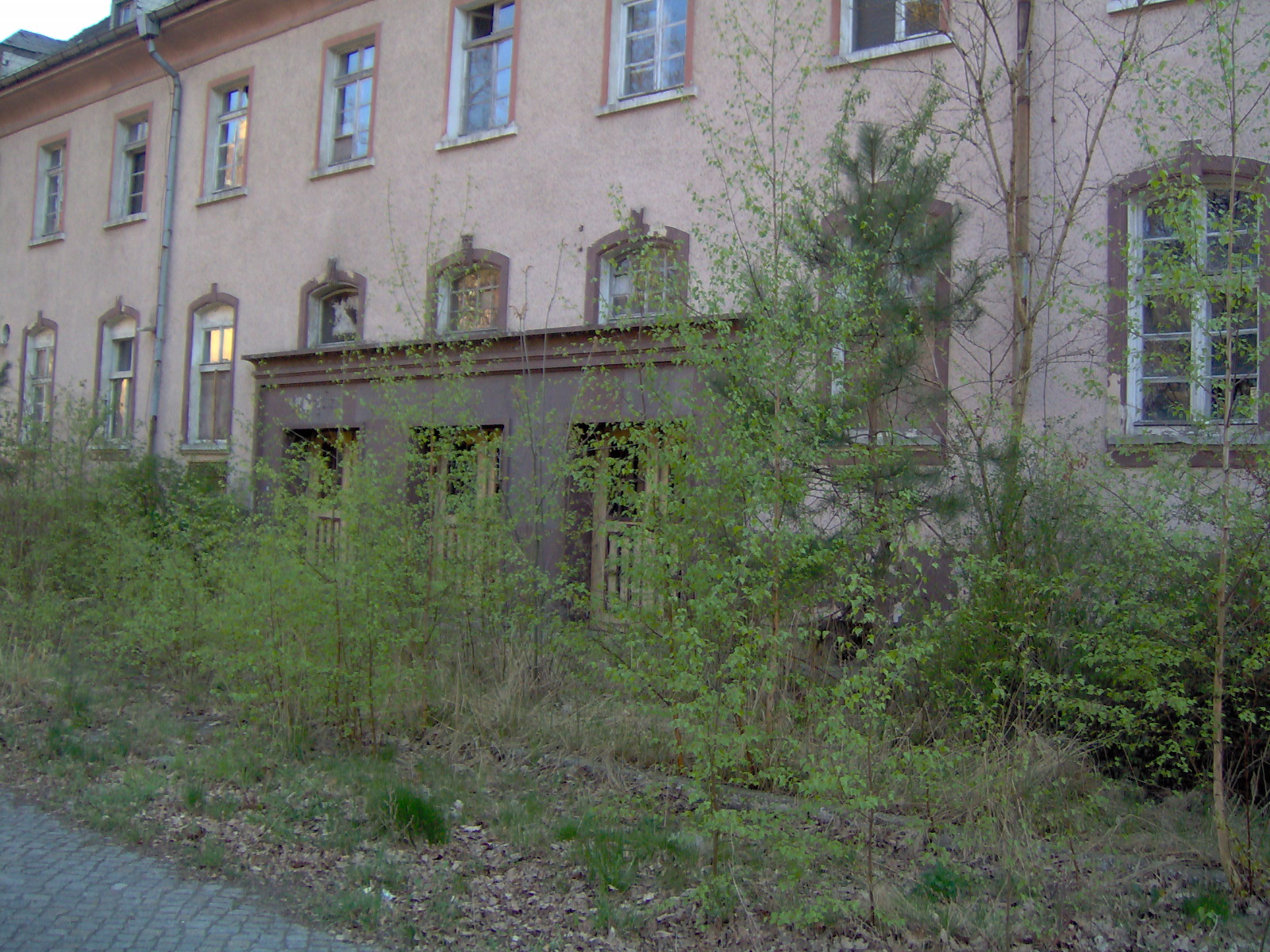 Koszary w Żarach , stołówka 11 pa i 20 ppanc